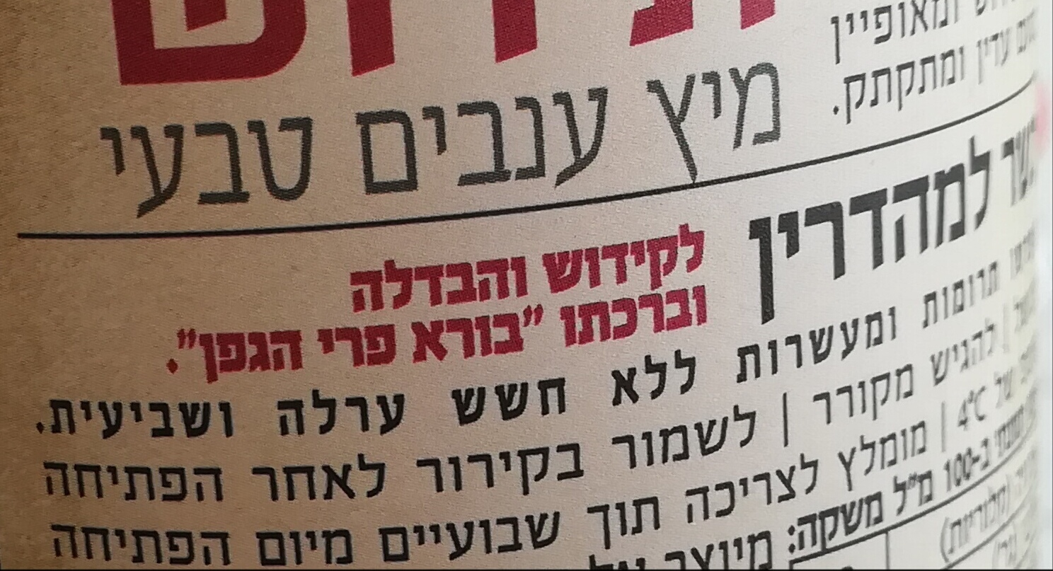 kosher label